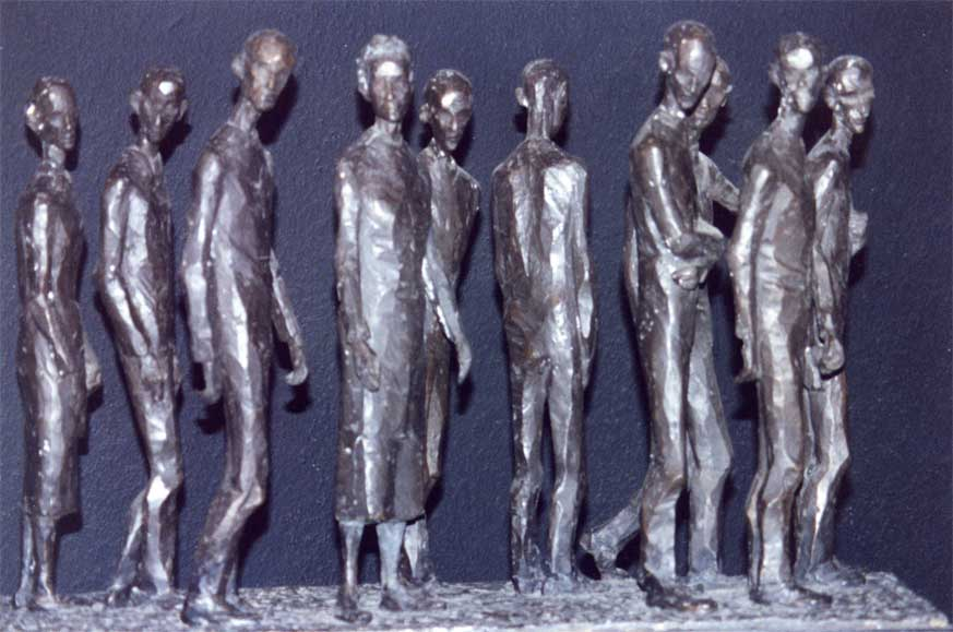 Auschwitz - foto gemaakt augustus 1993, gedigitaliseerd 21 november 2006